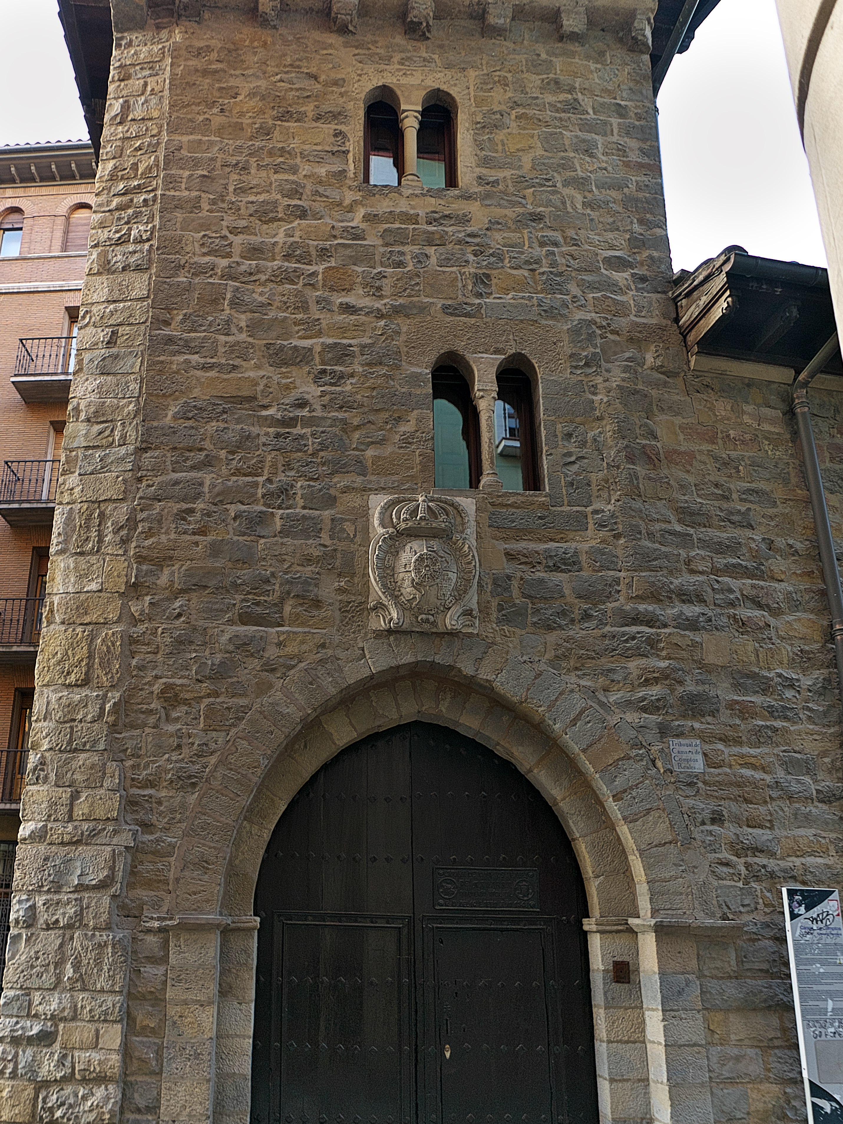 Cámara de Comptos de Navarra (1365). Institución promovida por Carlos II.